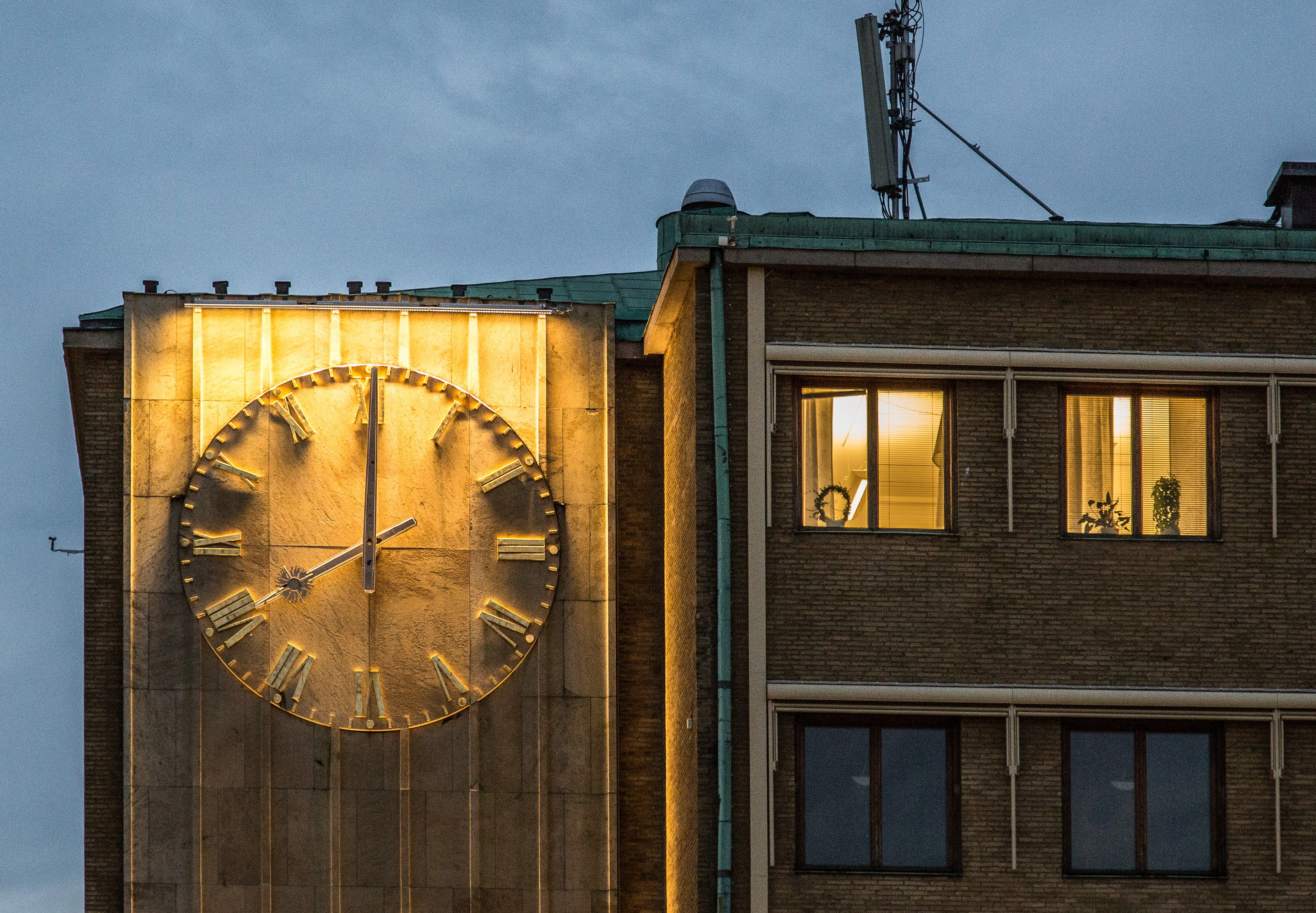 Brunnsparken & Södra Hamngatan